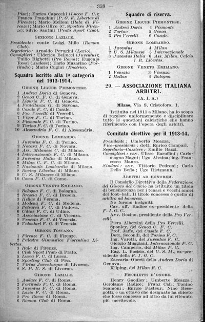 Pagina 359 della pubblicazione Almanacco dello sport del 1914.